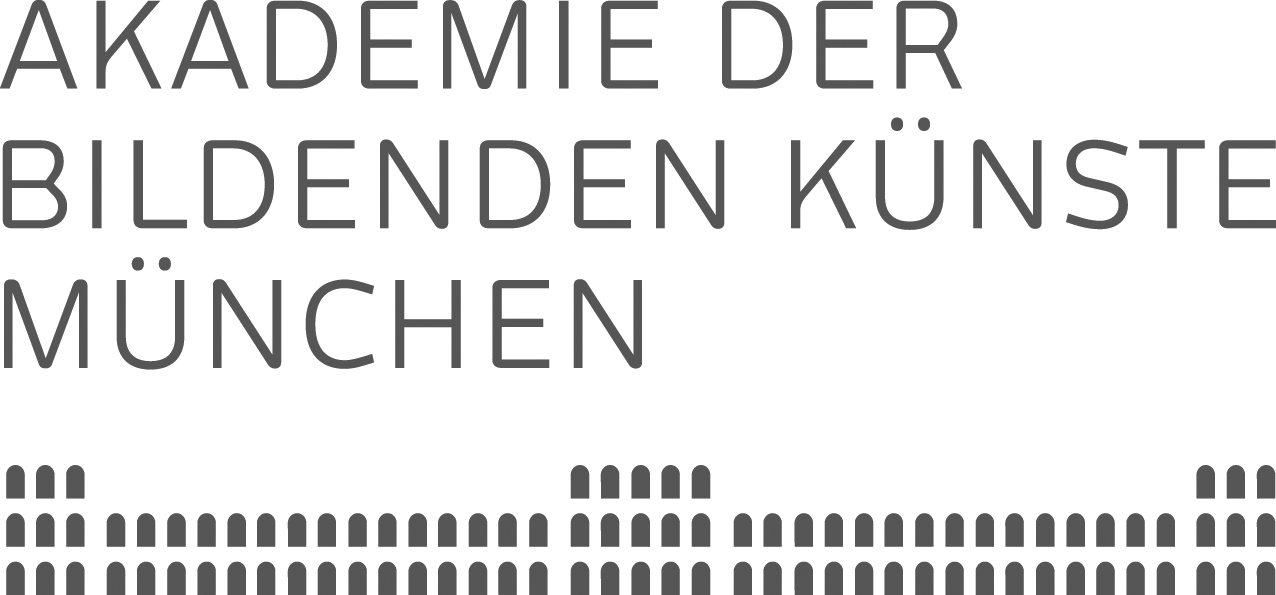 Logo von Akademie der Bildenden Künste München